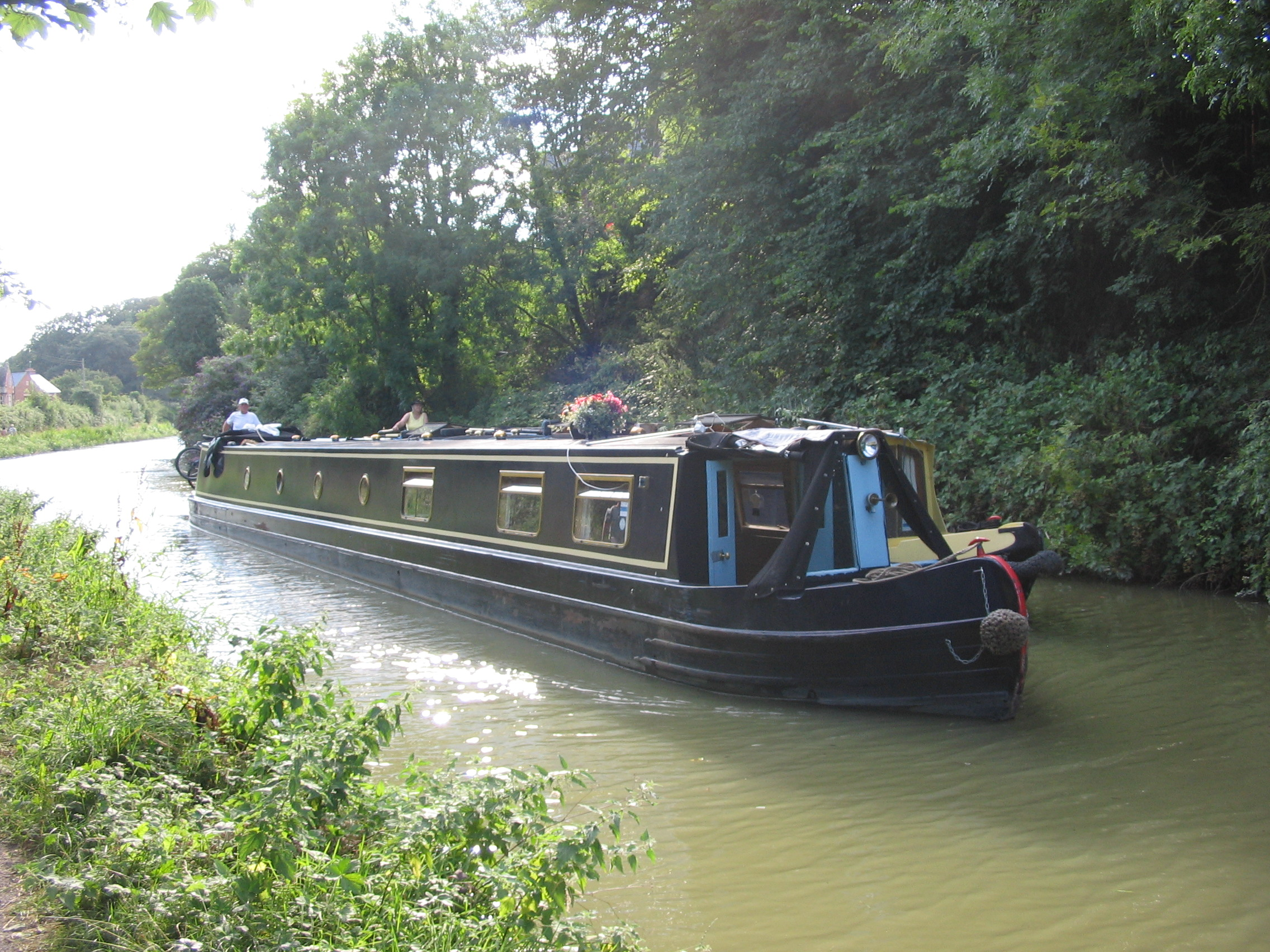 Narrow Boat op het Kennet and Avon Canal nabij Devizes - eigen foto - augustus 2006